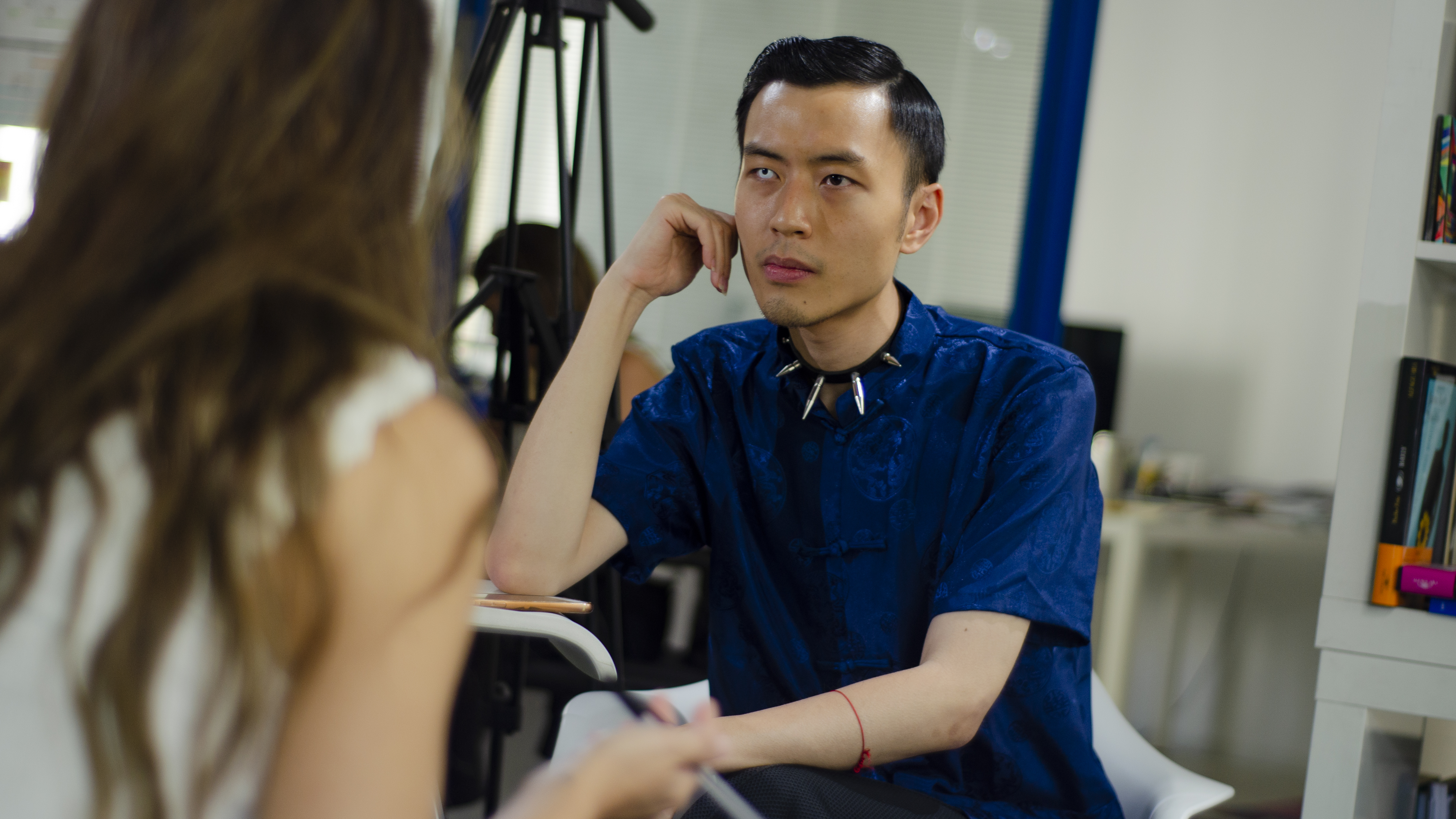 Chenta Tsai compone y canta pop, escribe columnas, es violinista de conservatorio y activista antirracista, pero todo lo hace bajo el seudónimo Putochinomaricón con el que se apropia de los insultos y pretende crear los referentes de los que careció.